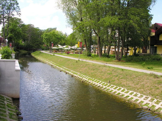 Per Palangą tekanti Rąžės upė Foto: Algirdas, 2006 m. birželio 29 d.